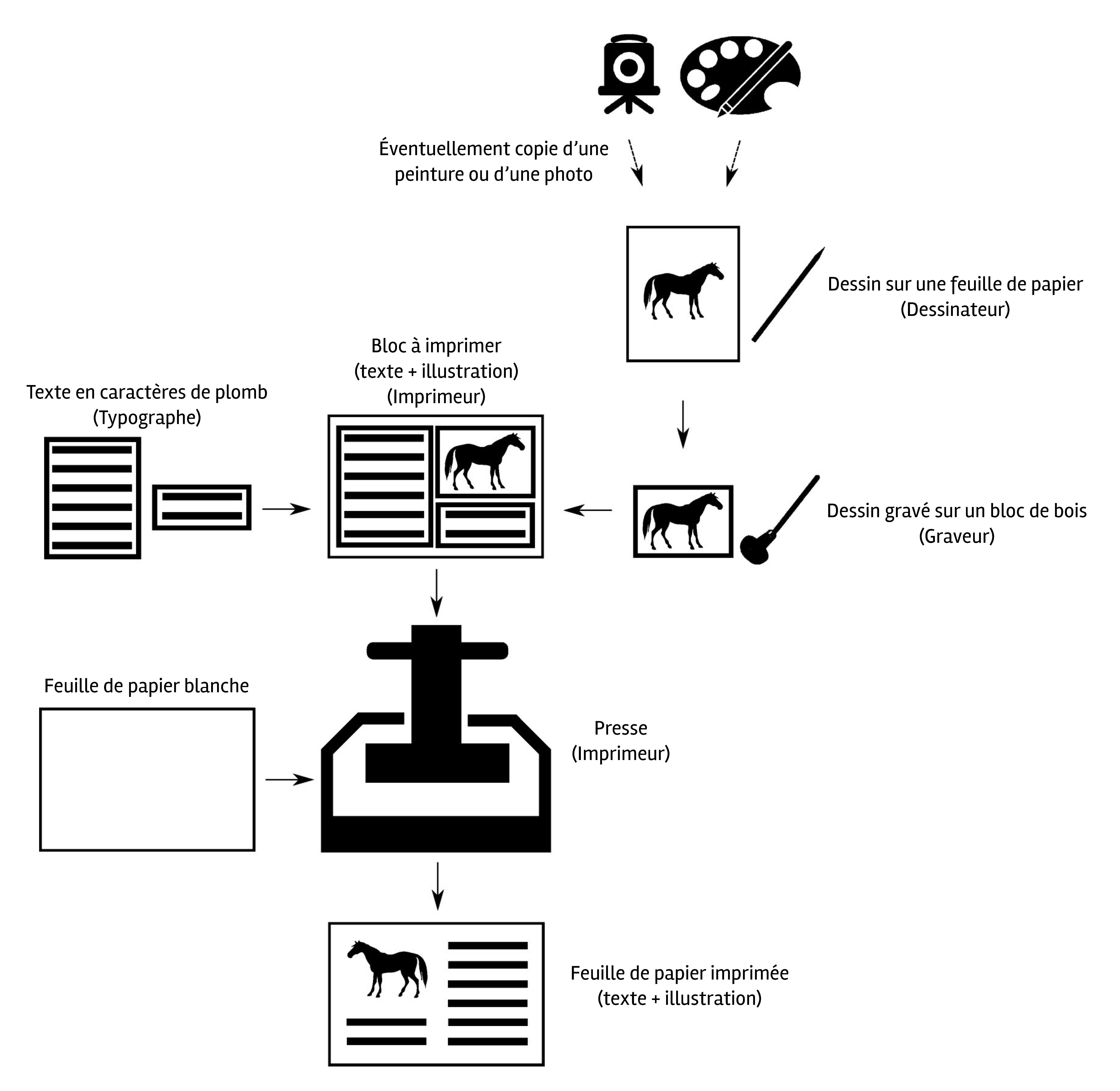 La gravure de reproduction au XIXe siècle : procédure d'impression d'une page illustrée pour un livre ou un journal. — L'illustrateur réalise le dessin directement sur une planche de bois ou sur une feuille de papier qui est ensuite décalquée sur le bois. Ce dessin est éventuellement une copie d'une peinture ou d'une photographie, ou est éventuellement réalisé à partir d'un croquis envoyé par un correspondant. Le bois utilisé est très dur (le plus souvent du buis) et est coupé perpendiculairement aux fibres (bois « de bout »). Le graveur se charge alors de graver le dessin. Il utilise un burin pour enlever les parties qui ne devront pas être imprimées (les blancs) et « épargne » les parties qui devront être imprimées (les noirs). Il s'agit d'une gravure en relief (taille d'épargne) qui possède le très grand avantage de permettre une impression « typographique », c'est à dire que l'on peut placer le bloc de bois gravé en relief avec les blocs de texte composés de caractères en plomb, eux aussi en relief. On pouvait ainsi imprimer en une seule passe le texte et les illustrations contenus sur une page. On remarque que l'impression inverse l'image (effet miroir).